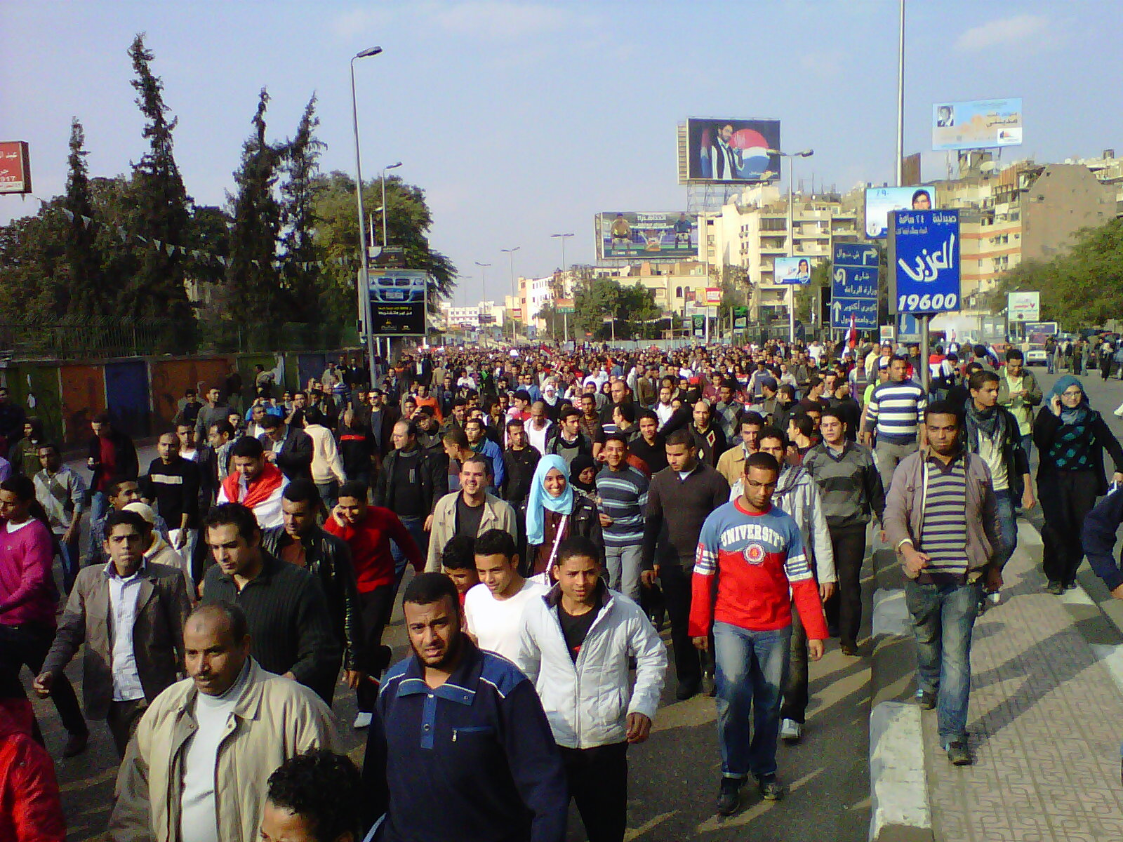 IMG00080-20110125-1447